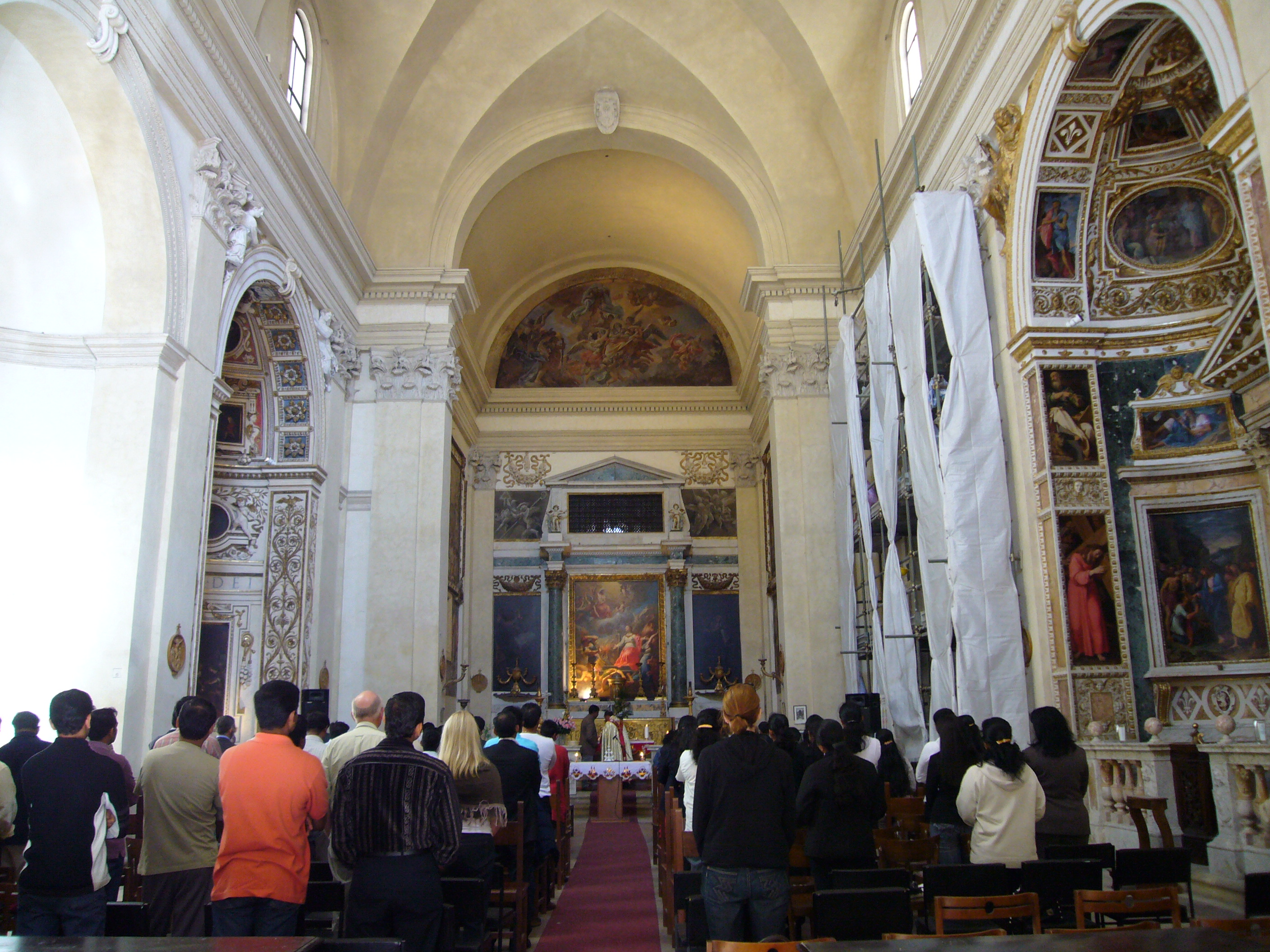 Roma, Santa Caterina dei Funari - interno